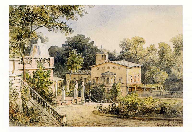 Das Hofgärtnerhaus in Potsdam-Sanssouci, Maulbeerallee, erbaut für Hermann Sello erbaut von seinem Schwager Ludwig Persius Das Gebäude wurde 1910 abgetragen und weiter westlich in veränderter Form wieder aufgebaut.